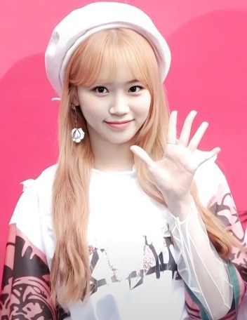 그룹 '아이즈원(혜원, 히토미, 채원)'이 20일 오후 서울 중구 동대문디자인플라자(DDP)에서 열린 '2019F/W 서울패션위크' 빅팍 컬렉션에 참석했다. ·